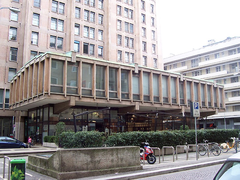 Milano (Italia), ingresso alla Torre Velasca.